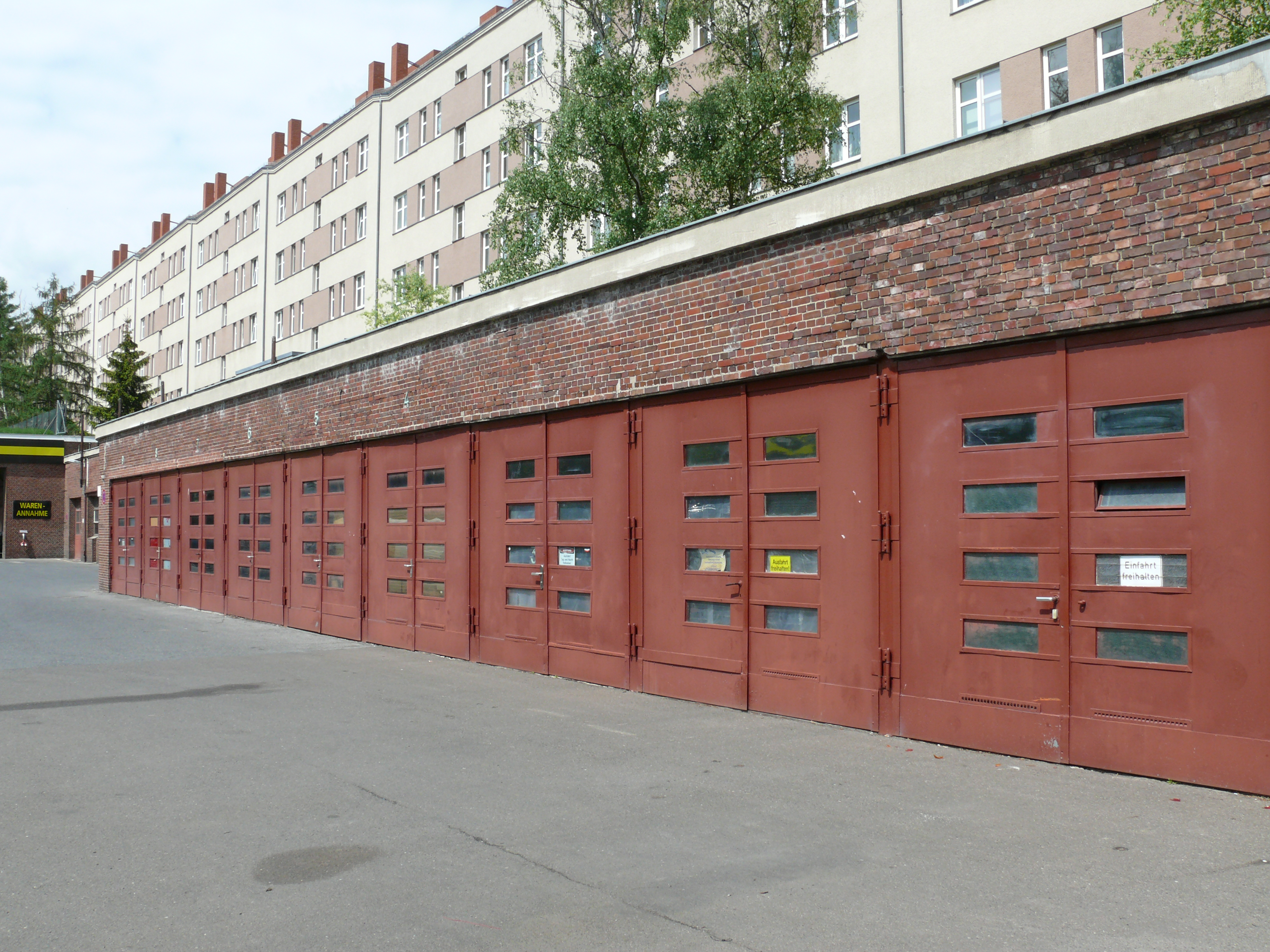 Berlin-Westend Königin-Elisabeth-Straße Betriebshof Garagen